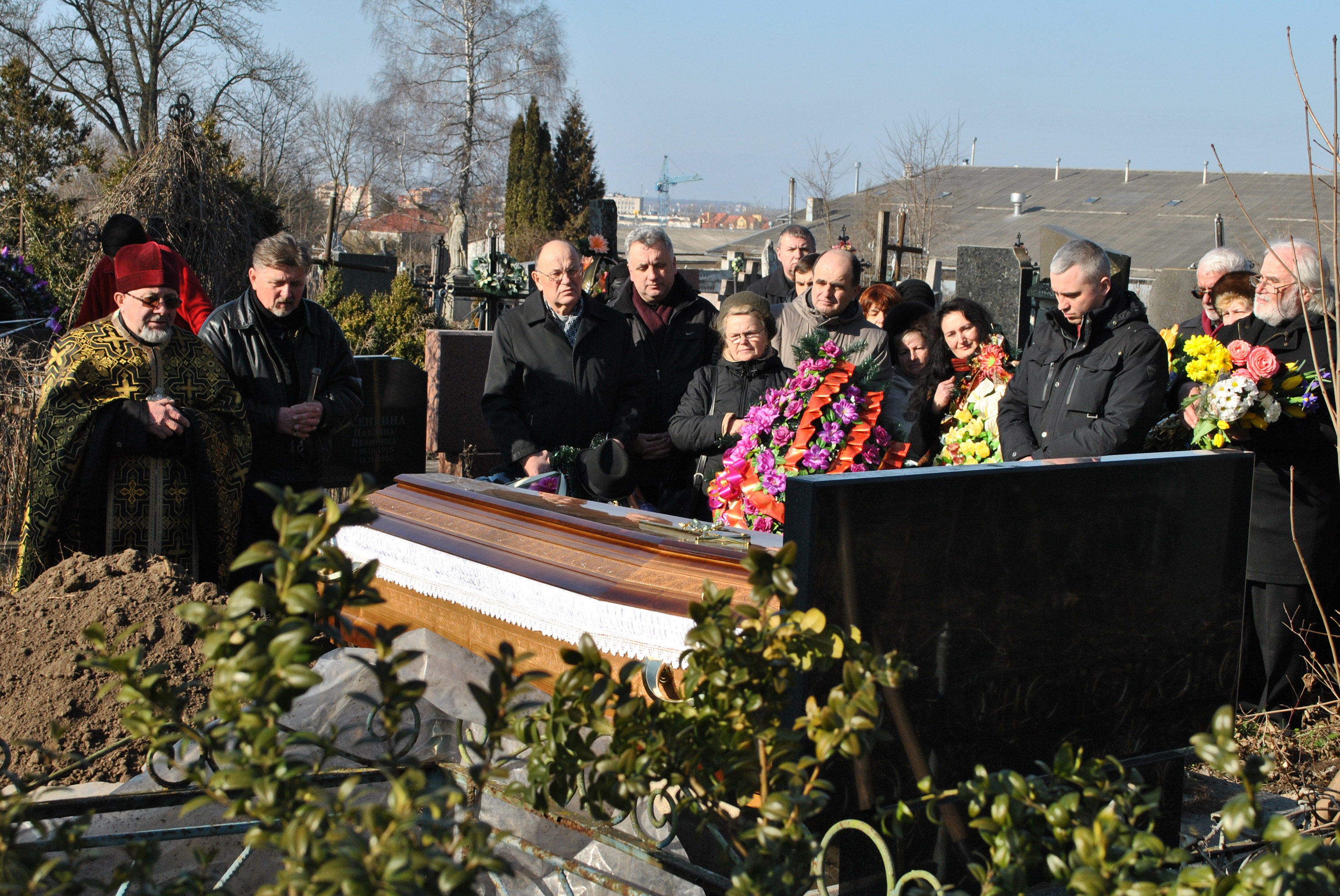 Похорон українського архівіста, краєзнавця, членкині ВУСК, уродженки м. Тернополя, авторки книги «Тернопіль у плині літ» Любомири Степанівни Бойцун (м. Тернопіль, Микулинецьке кладовище, 6 березня 2015 року)